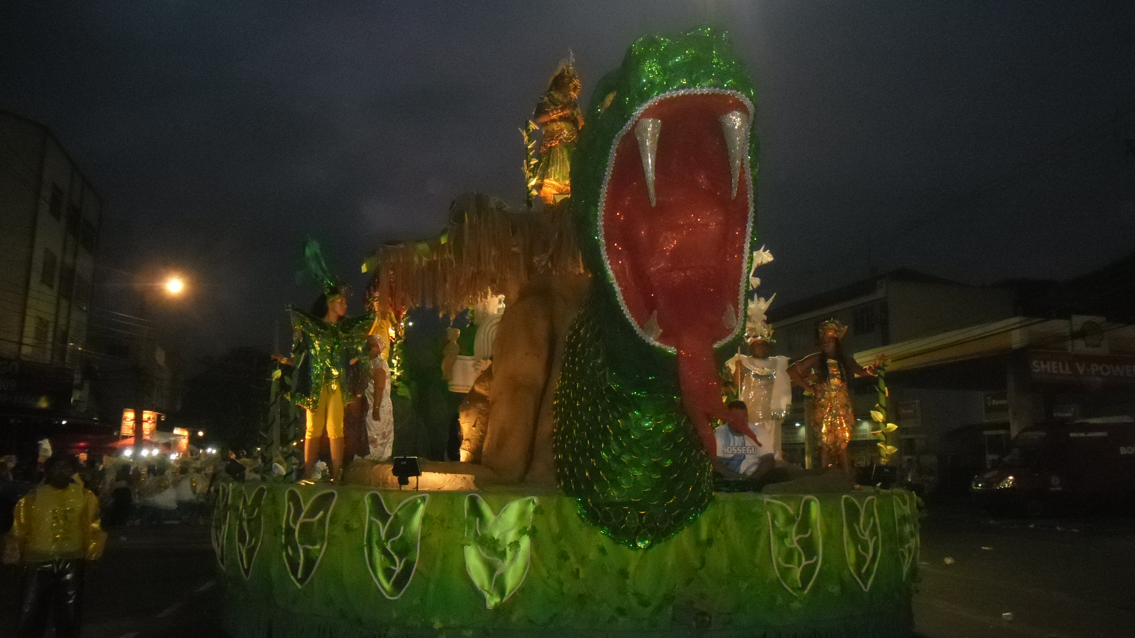 GRES Acadêmicos do Sossego